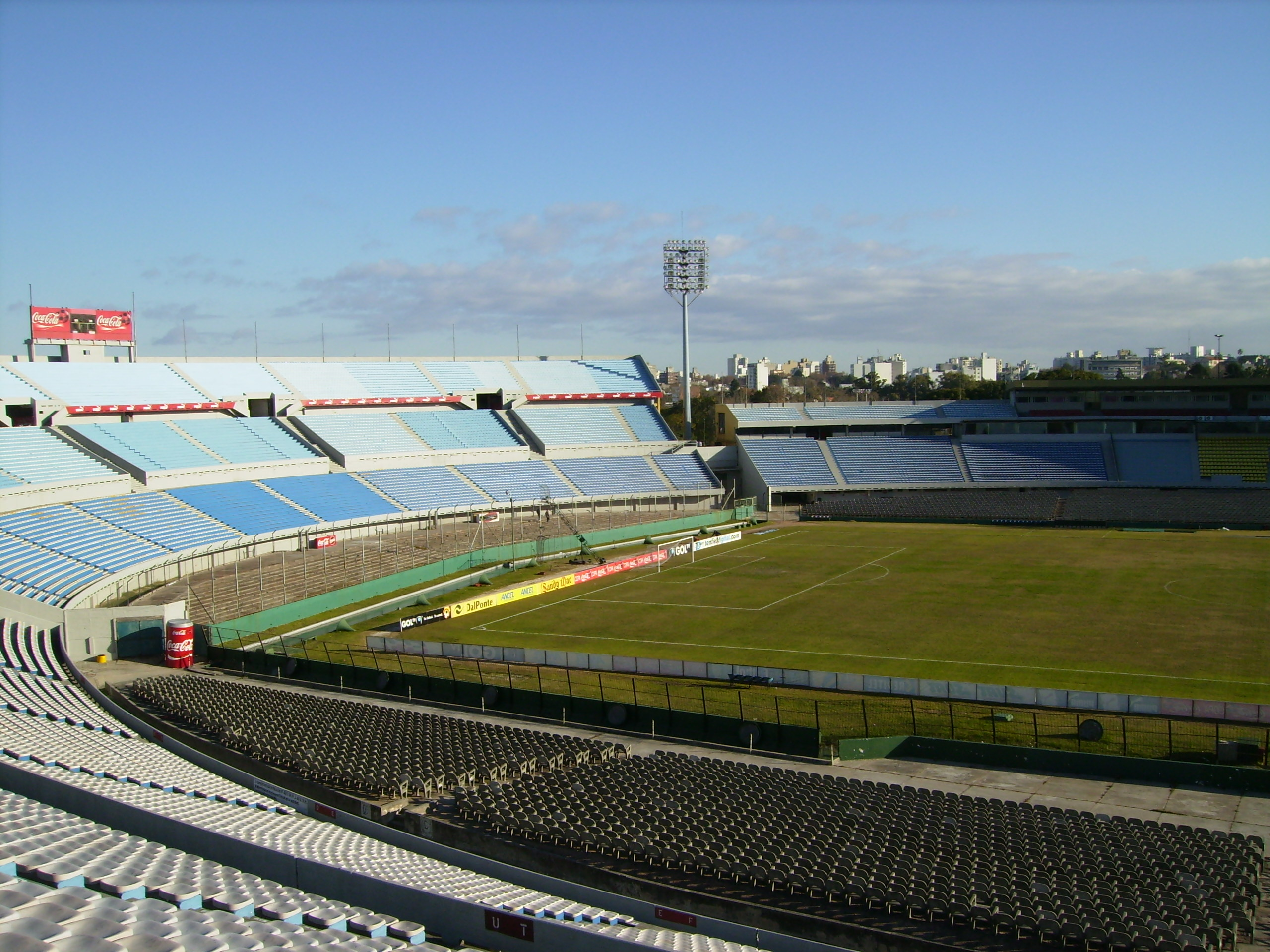 Estadio Centenario (Montevideo, Uruguay).